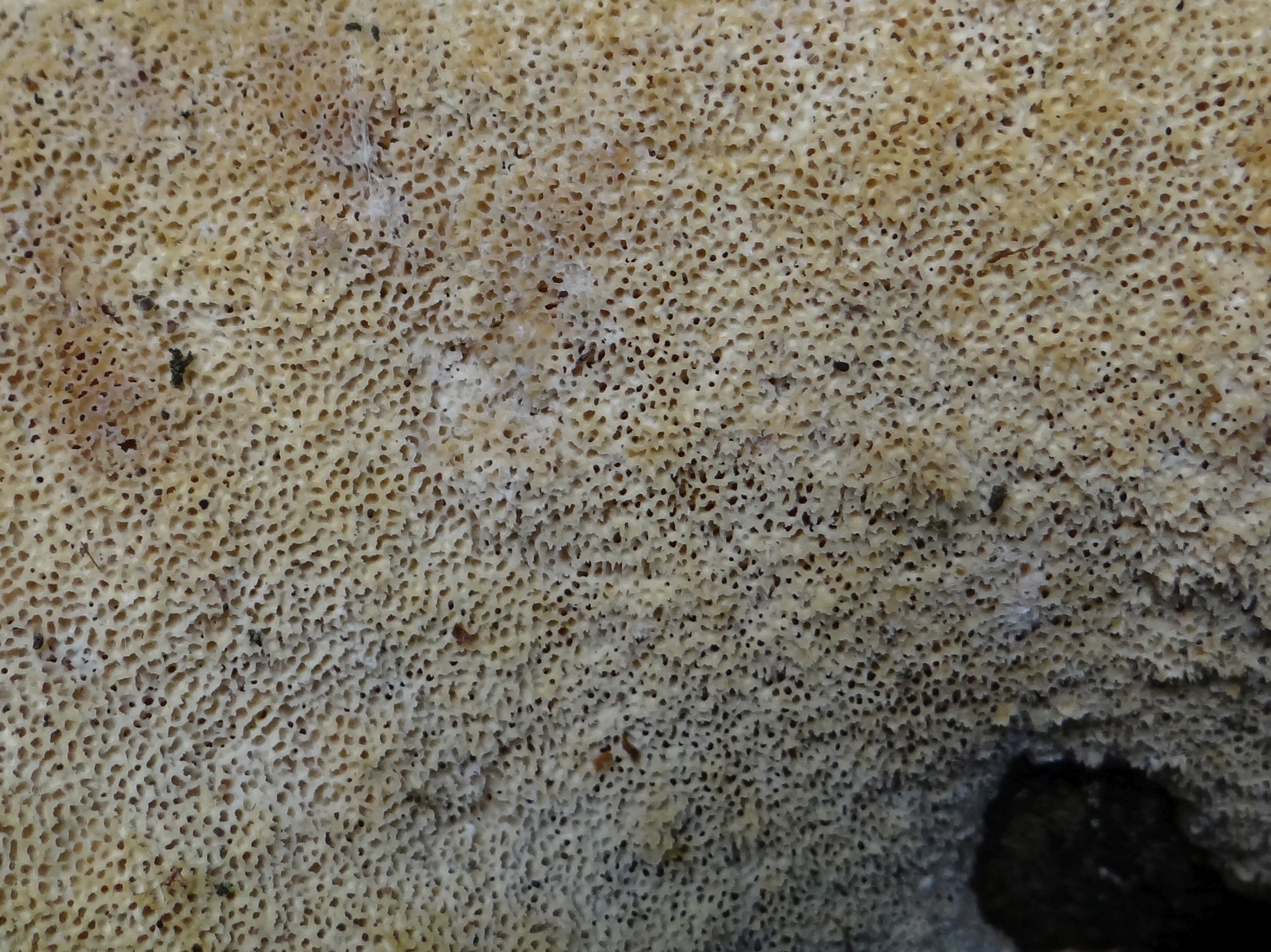 Perenniporia medulla-panis, hymenofor (location: Poland, Beskid Wyspowy, Lubogoszcz)